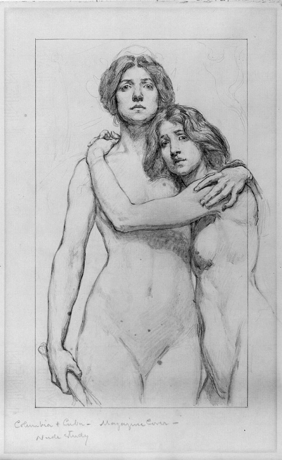 Cuba and Columbia embrace